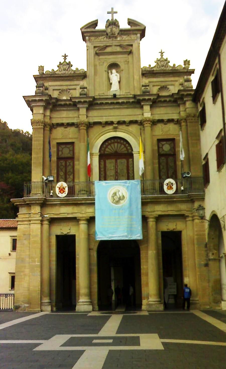 Facciata dell'ingresso principale del Santuario di San Francesco a Paola (CS)